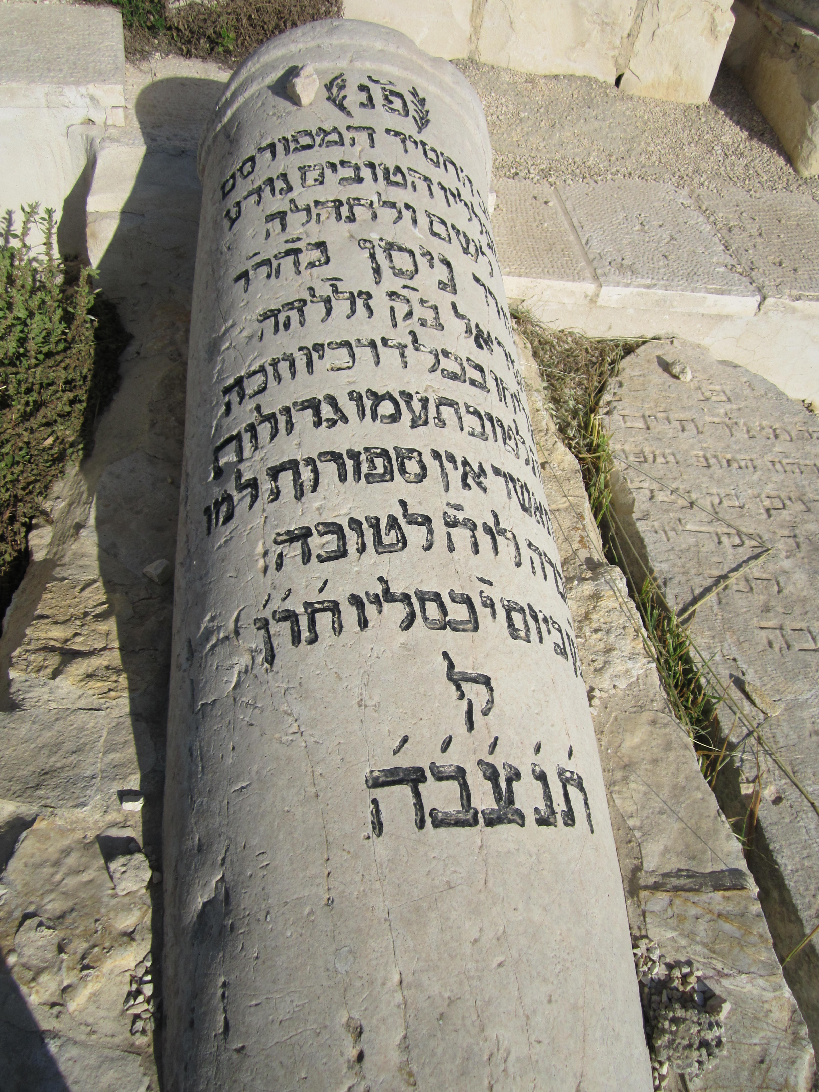 קבר ניסן ב"ק הר הזיתים